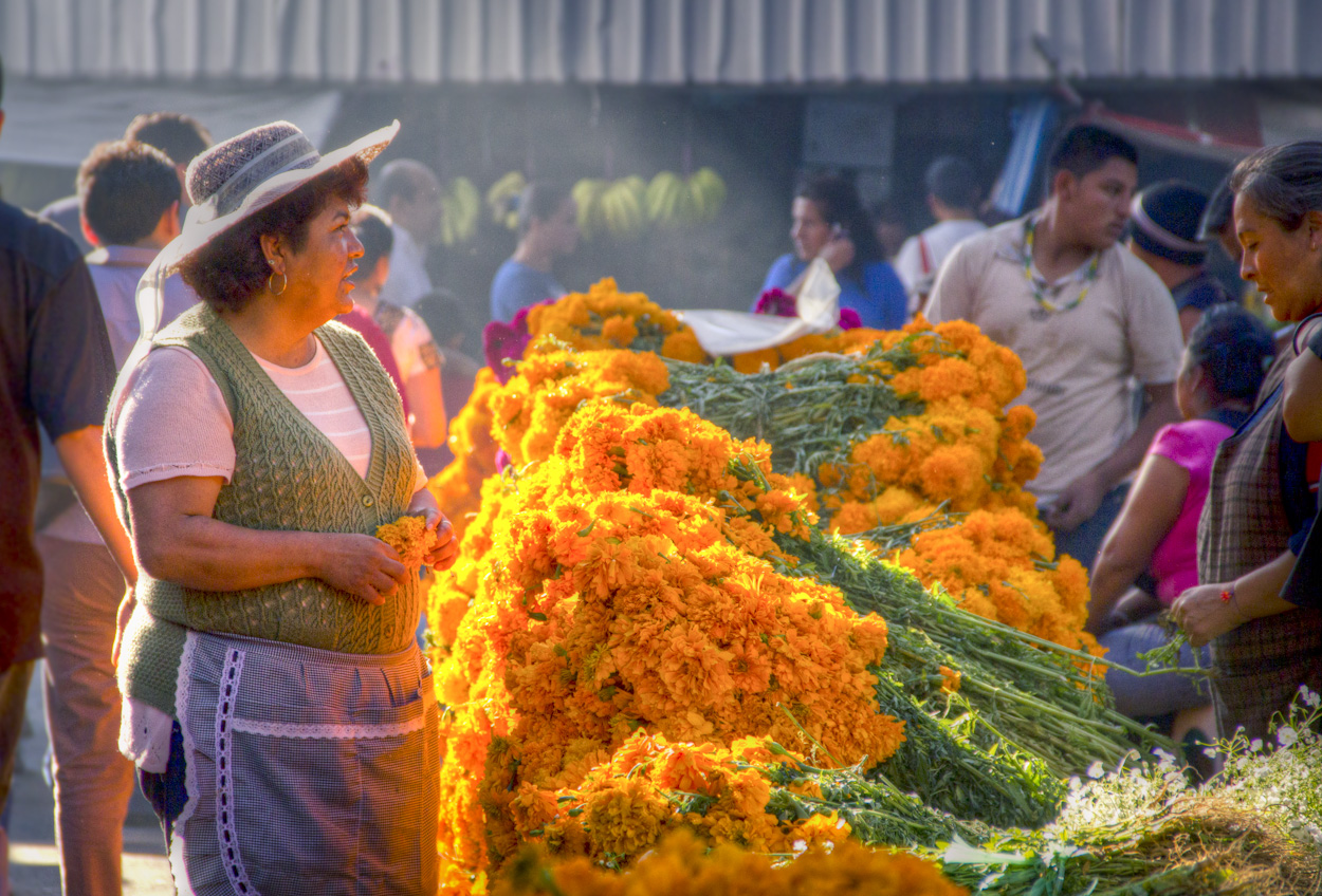 Mercado de Jamaica